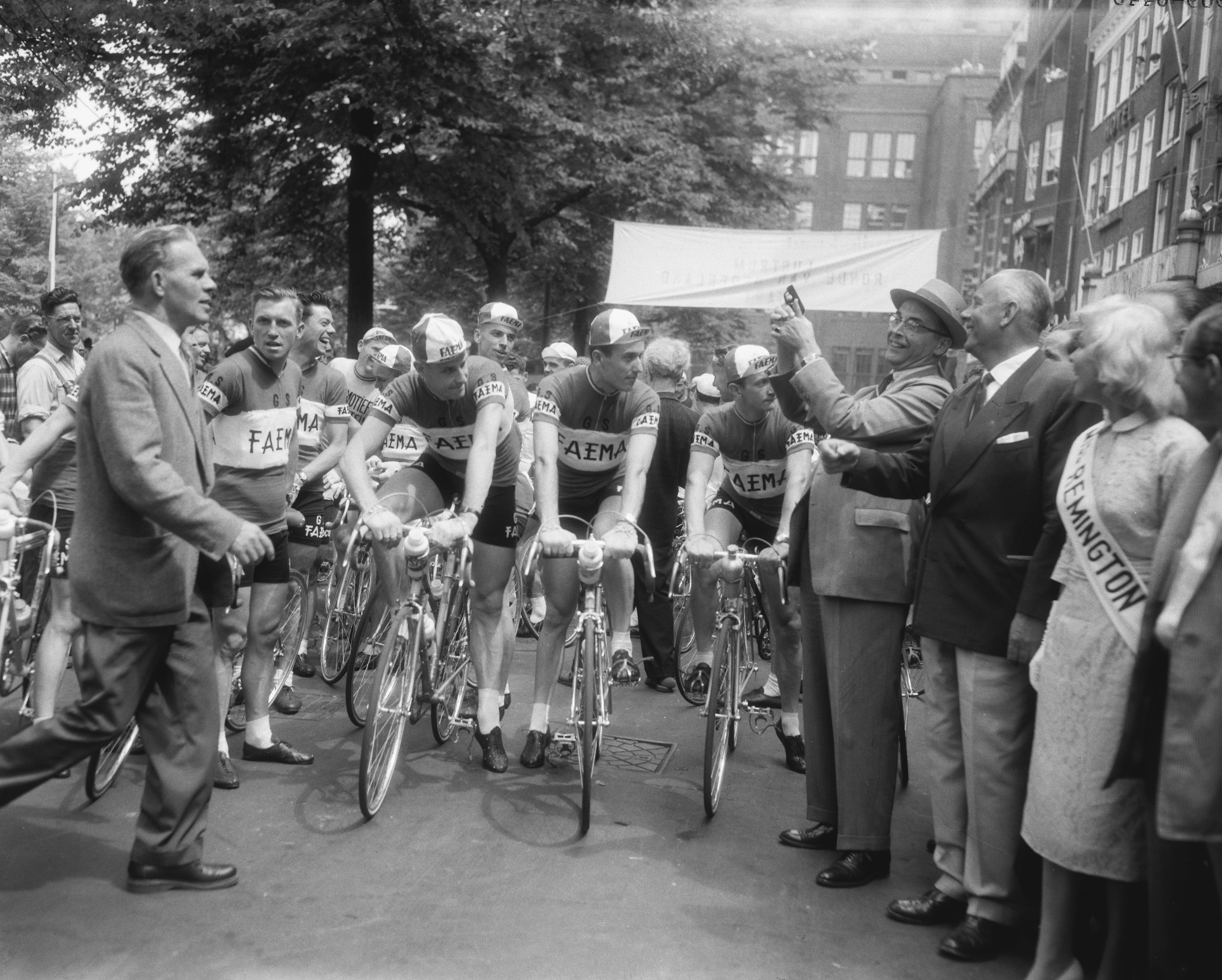 Collectie / Archief : Fotocollectie Anefo Reportage / Serie : [ onbekend ] Beschrijving : Mislukte start door burgemeester van Hall Datum : 17 juni 1958 Trefwoorden : wielrennen Persoonsnaam : Hall, Gijs van Fotograaf : Pot, Harry / Anefo Auteursrechthebbende : Nationaal Archief Materiaalsoort : Negatief (zwart/wit) Nummer archiefinventaris : bekijk toegang 2.24.01.04 Bestanddeelnummer : 909-6440